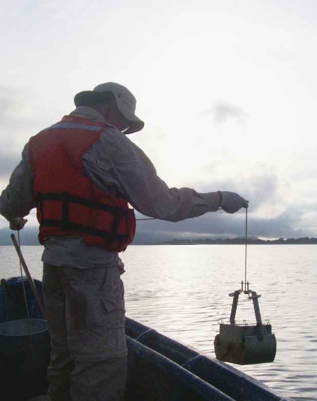 Método de colecta de macroinvertrebados en sistemas lenticos utilizando draga Eckman